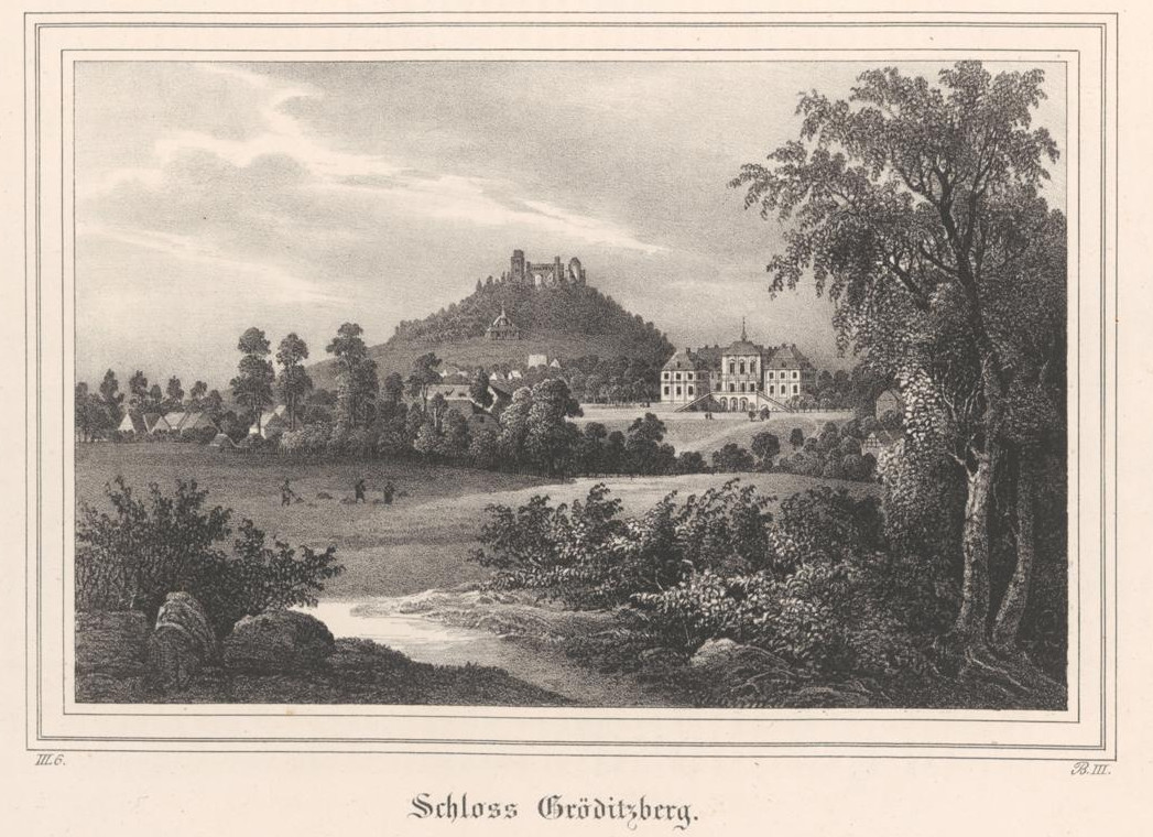 Schloss Gröditzberg, Lithographie : 18 x 12 cm, Heinrich Wilhelm Teichgräber